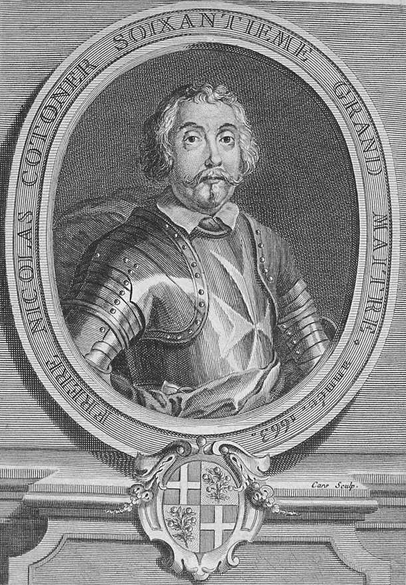 Gran Maestre de la Orden de Malta